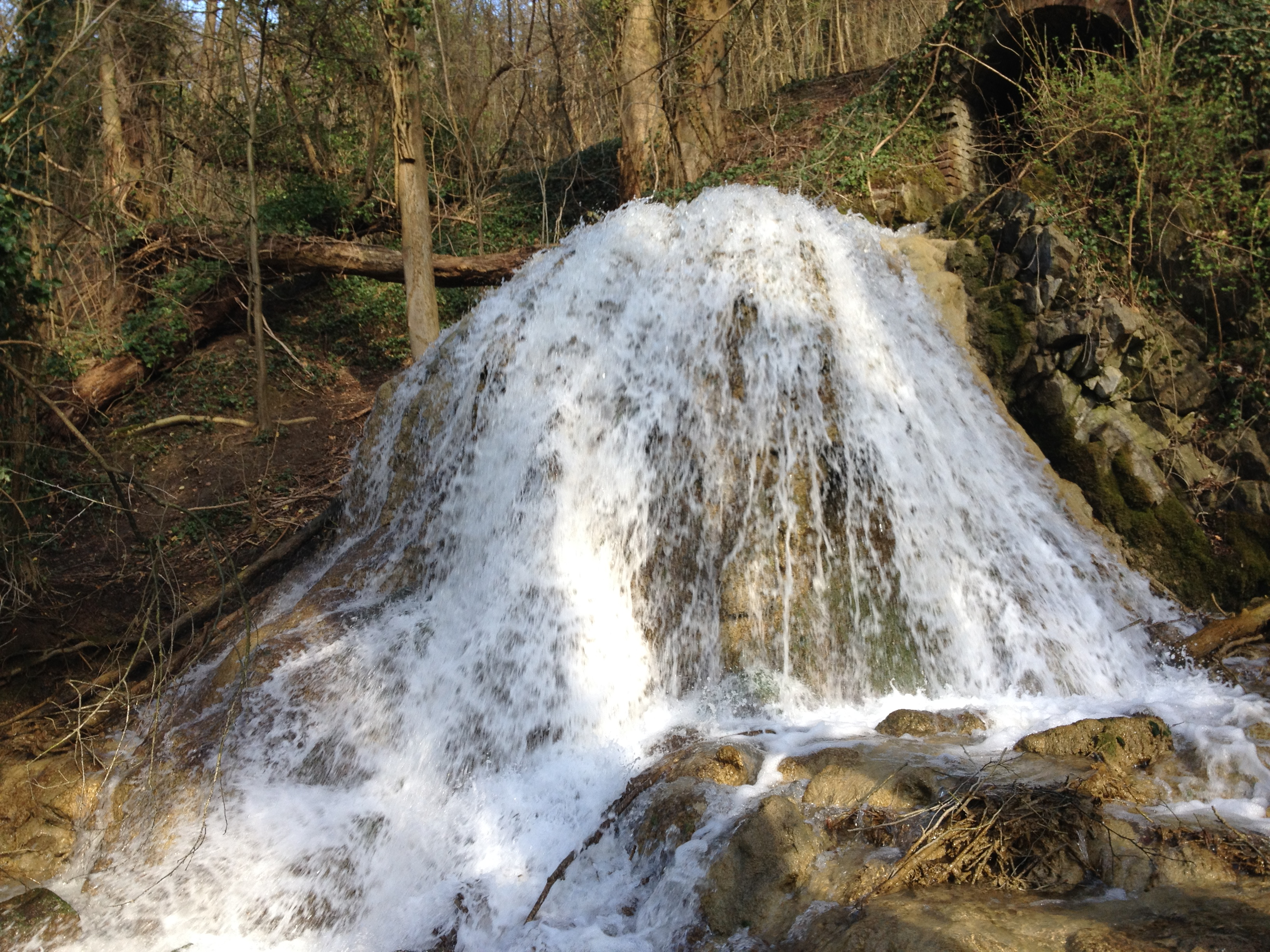 Unterer Laubach-Wasserfall im Naturschutzgebiet „Laubacher Steinbruch“, Neandertal in Mettmann, Deutschland, März 2014